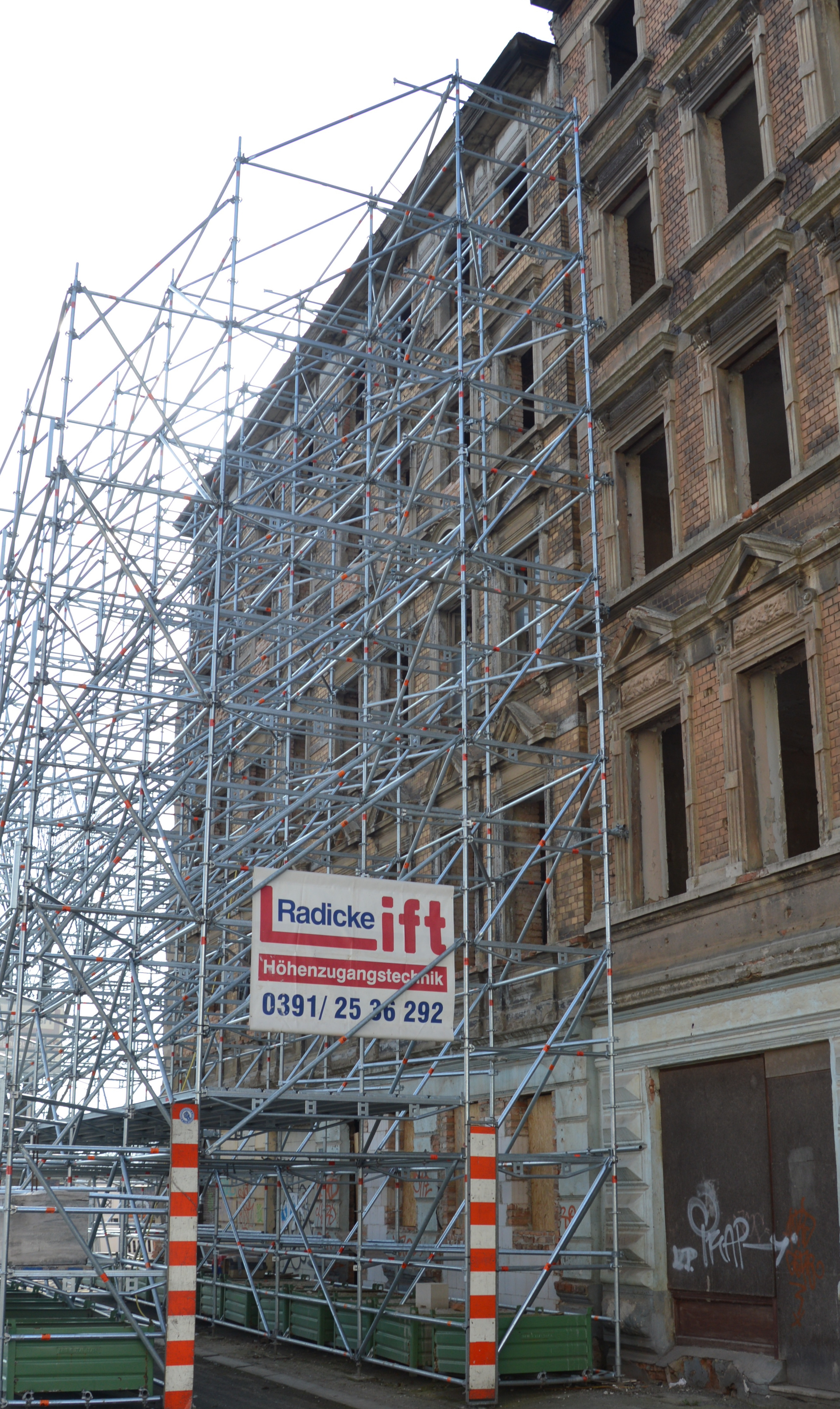 Sudenburger Straße 24 in Magdeburg